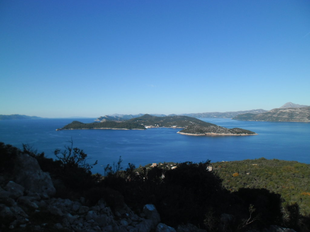 pogled s Lopuda, ispod Sutvrača